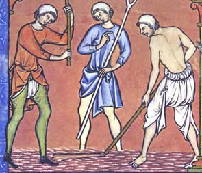 Medieval braies